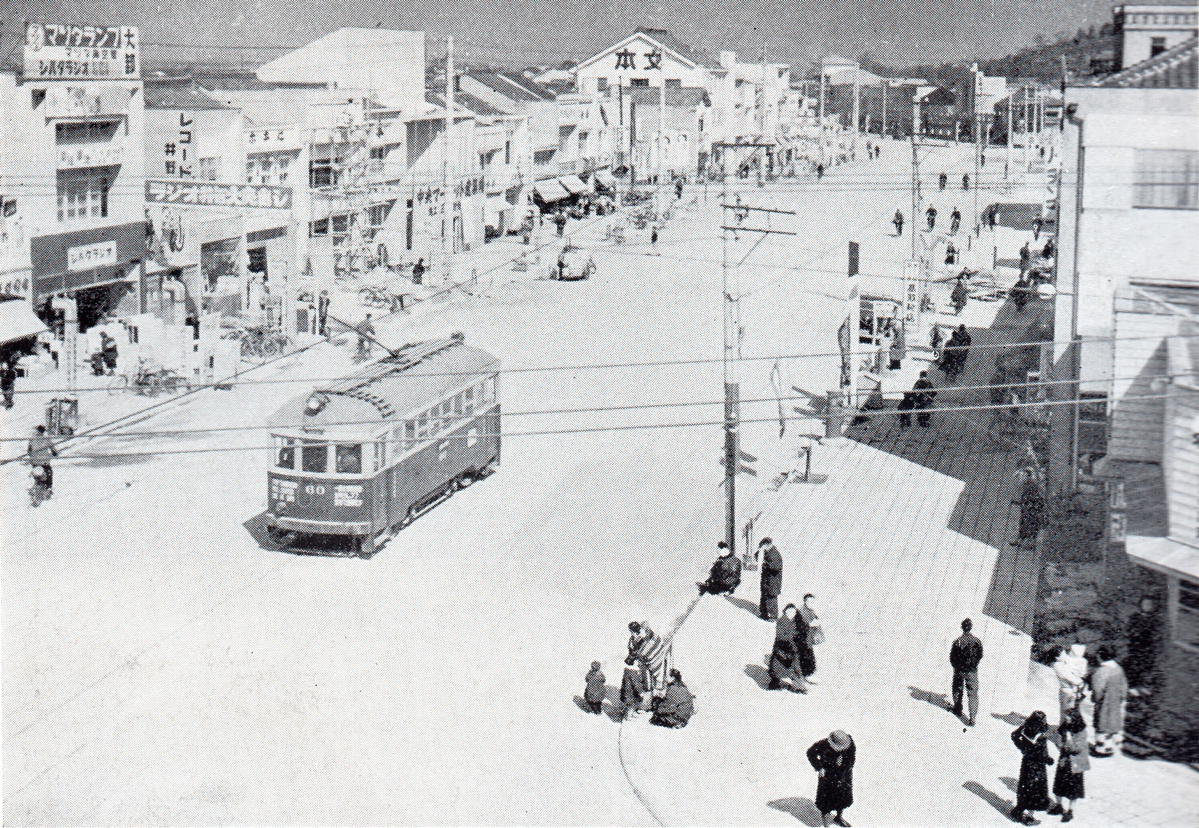 愛知県岡崎市本町通1丁目、2丁目